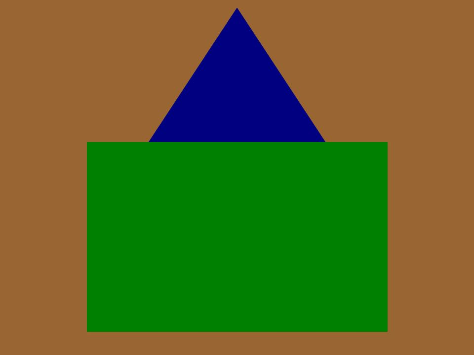 The Winnipeg Grenadiers